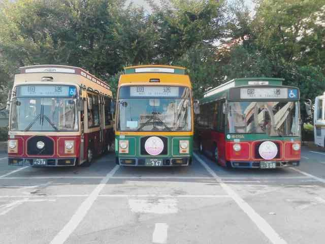 めぐりん各路線専用車。左から東西めぐりん、南めぐりん、北めぐりん